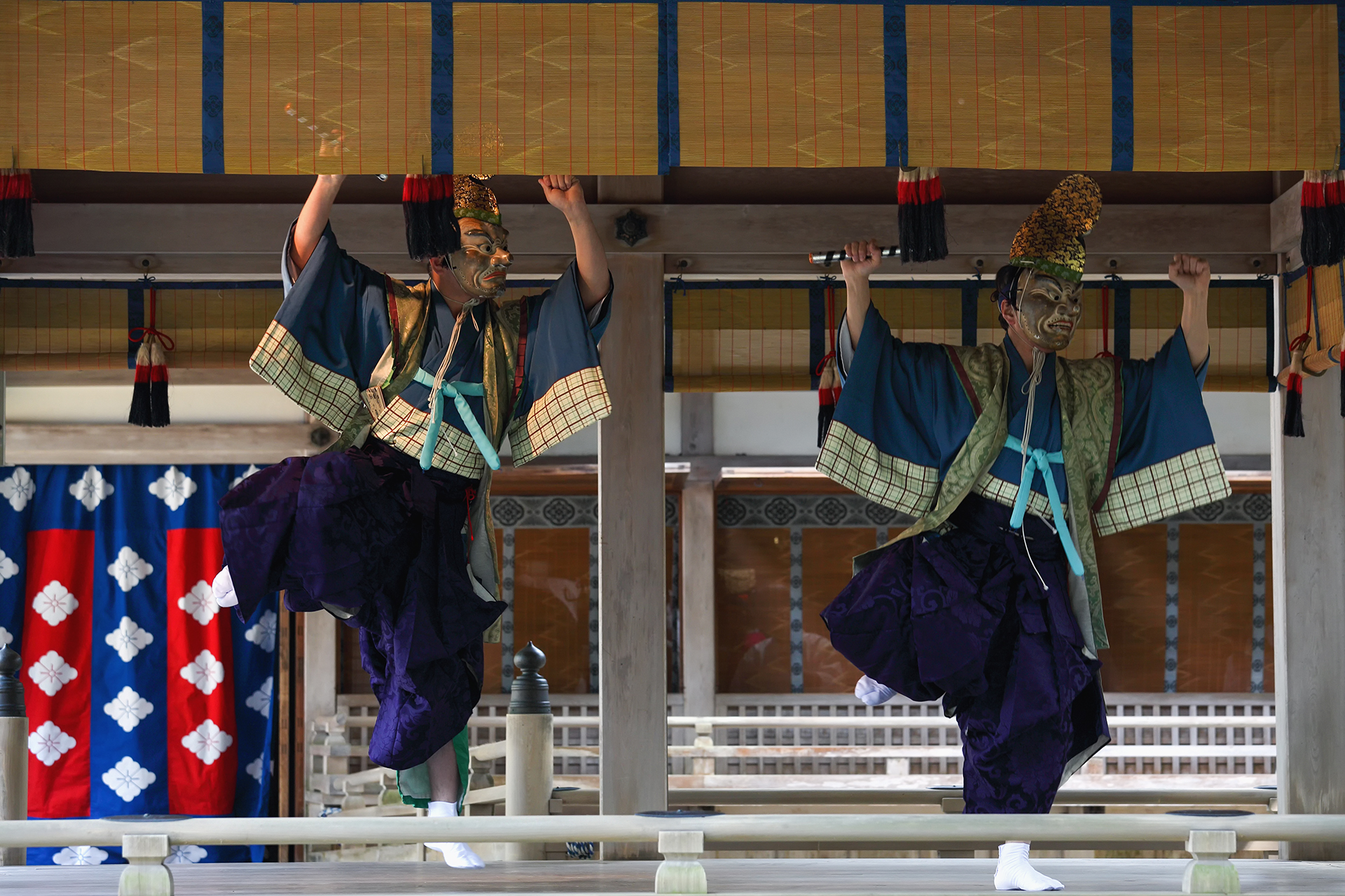 越後一宮彌彦神社の妻戸大神例祭（妃神例祭）に舞殿で奏される、舞楽「大々神楽」の「大納蘇利」（大人面舞二人）。国重要無形民俗文化財に指定されている。